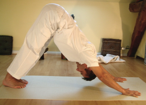 Yoga postures Ado-muka-shvanasana